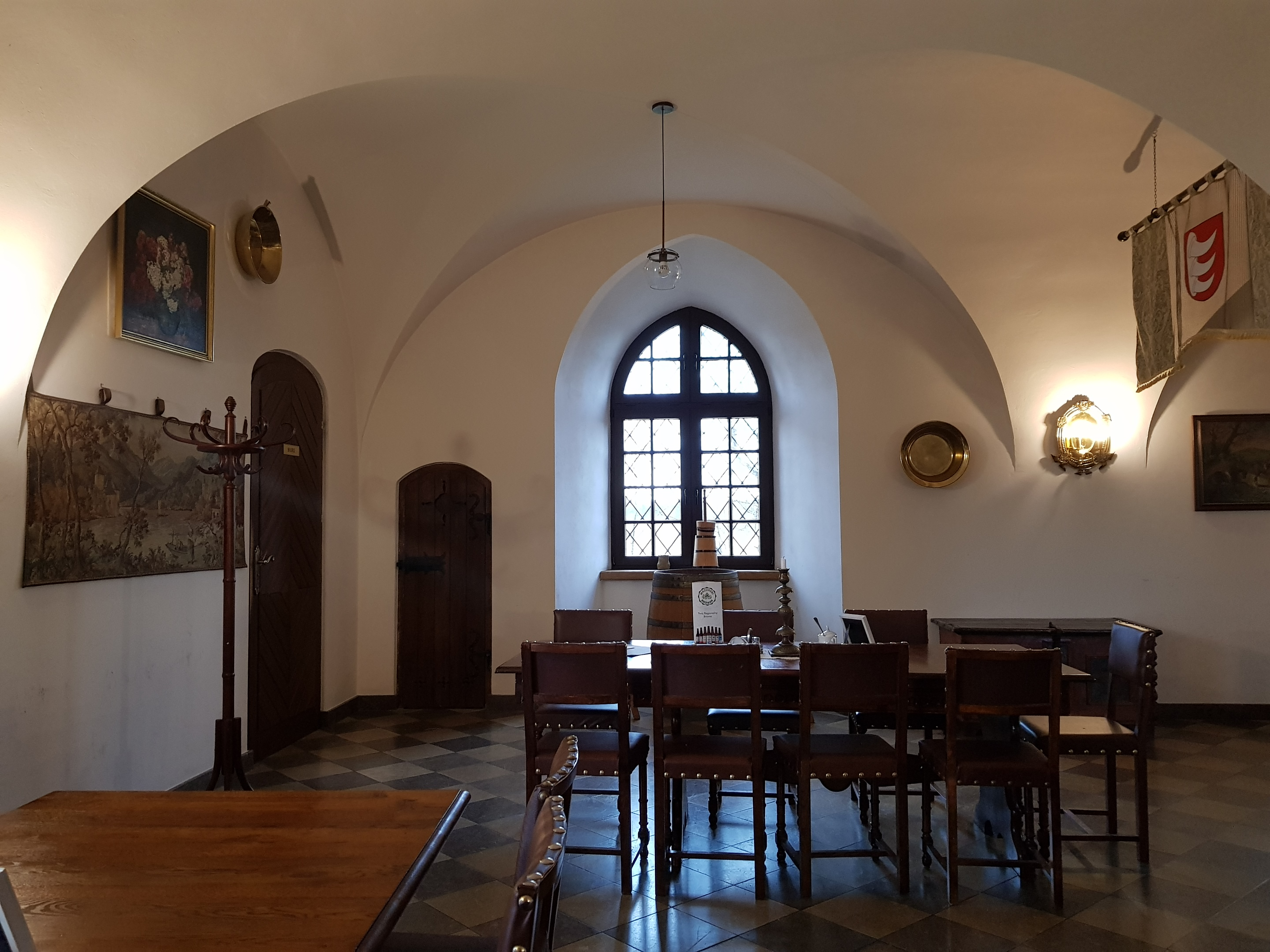 Restauracja na zamku w Tykocinie